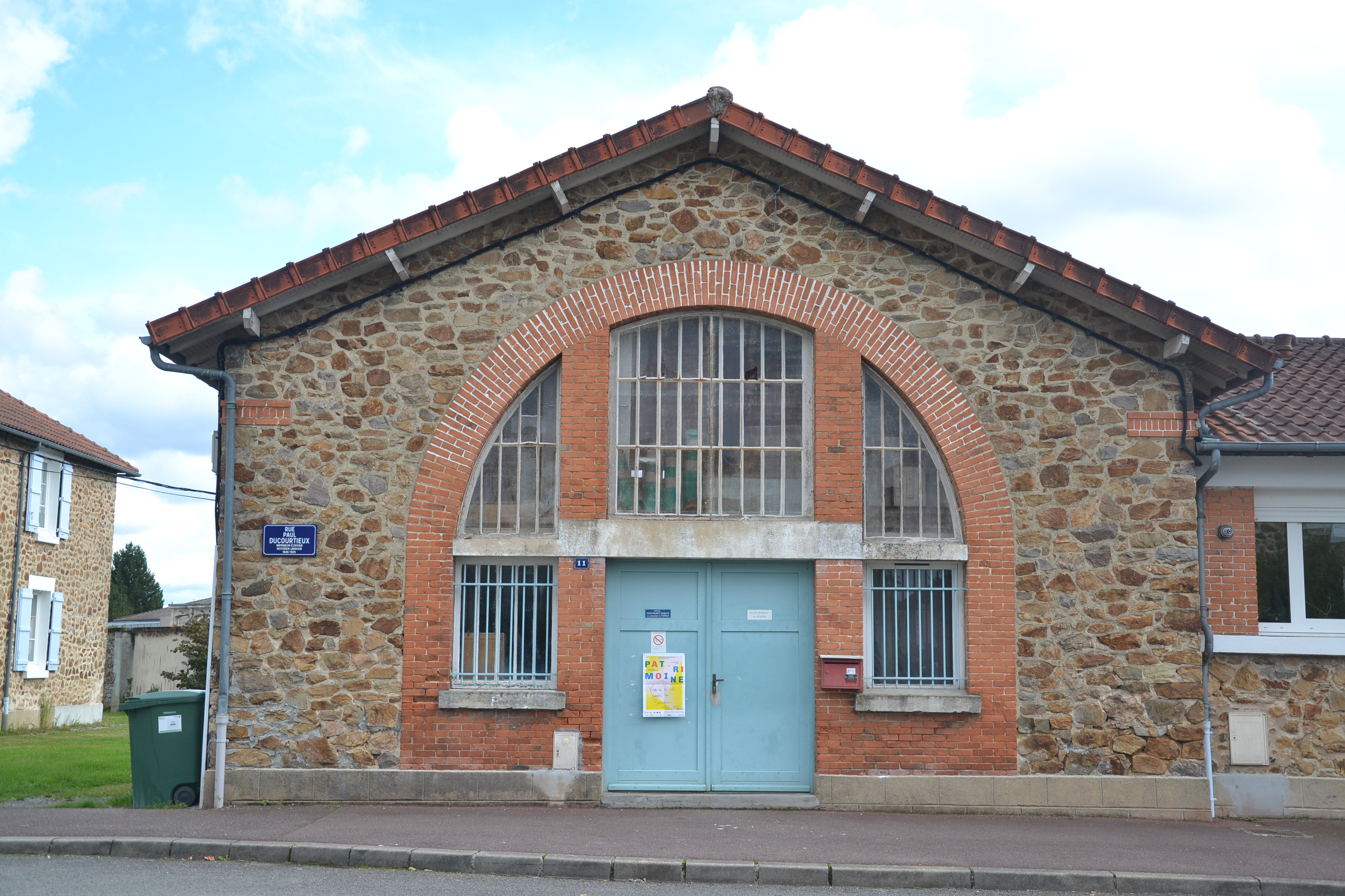 Visite guidée de la cité-jardin de Beaublanc à Limoges (Haute-Vienne, France) à l'occasion des Journées européennes du patrimoine 2017. Les bains-douches.